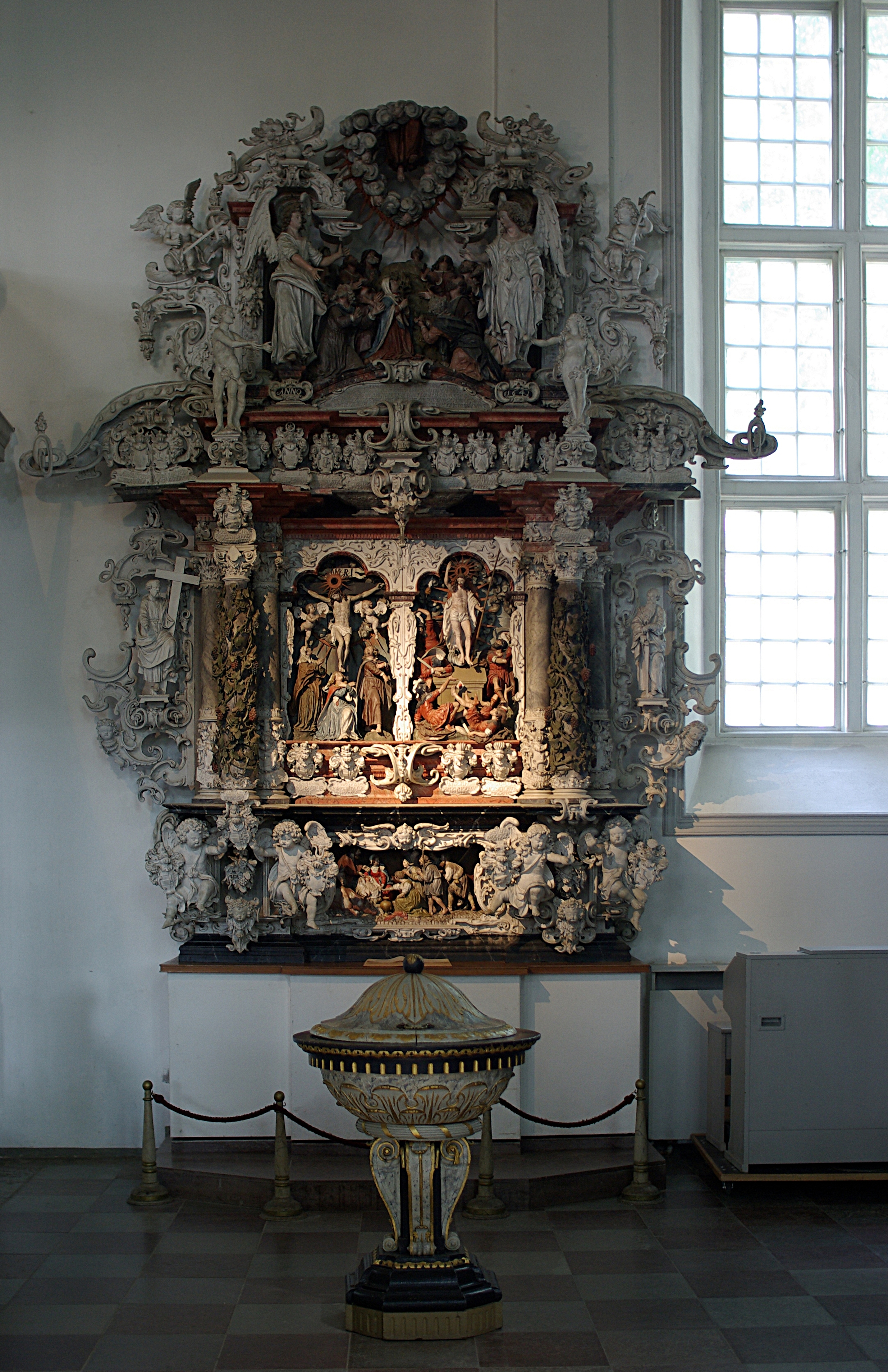 Kappeln in Schleswig-Holstein. Der Gudewerdt Altar befindet sich an der Nordseite der Kirche.